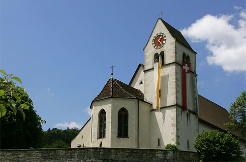 Kirche in Dittingen